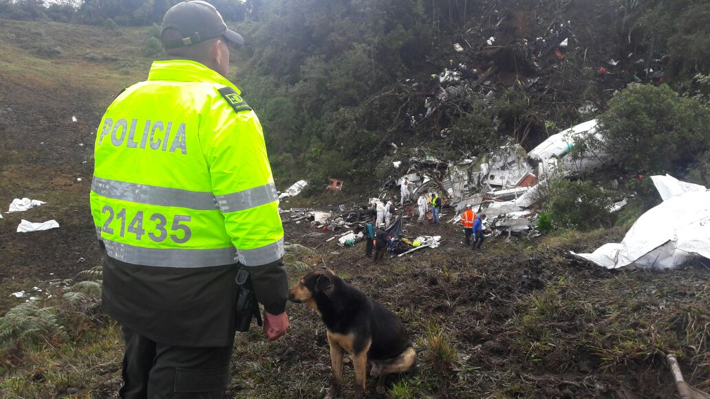 Labores de rescate de la Policía Nacional de Colombia al vuelo 2933 de LaMia, en área rural de La Unión (Antioquia).